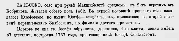 Информация о Залесском из "Сказания о населенных местностях..." Лаврентия Похилевича